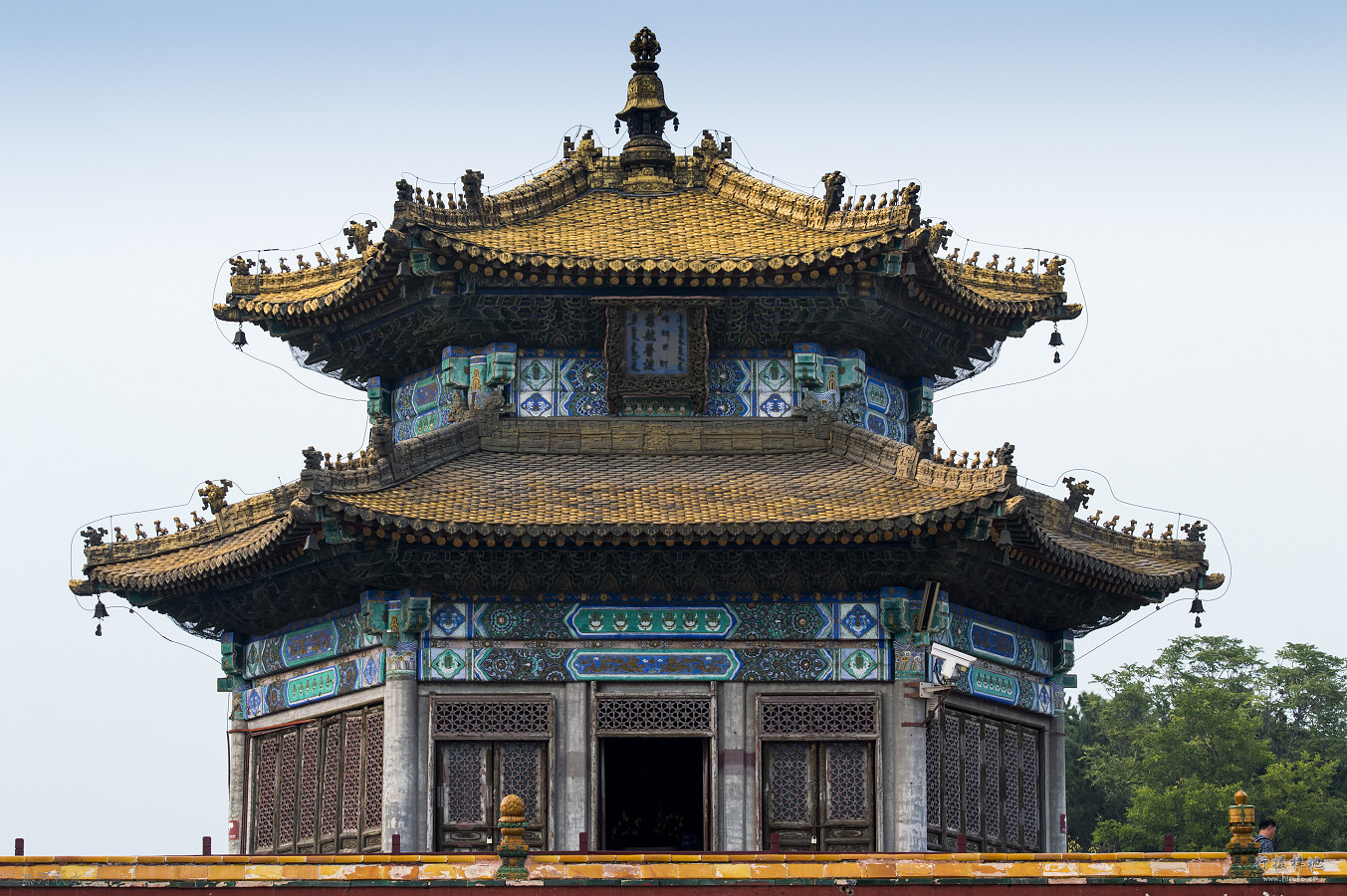 中文（中国大陆）: 整个寺庙的最高点，六角的“慈航普渡”亭